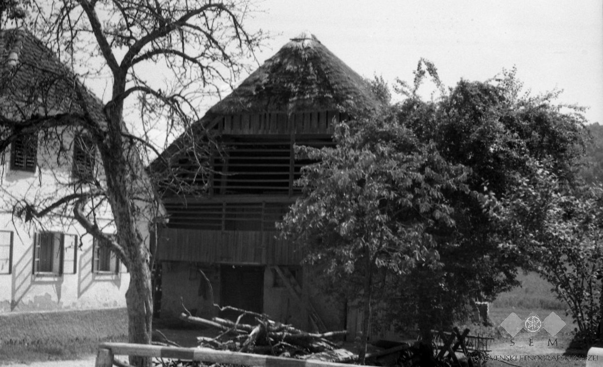 Štala (hlev), Socka.